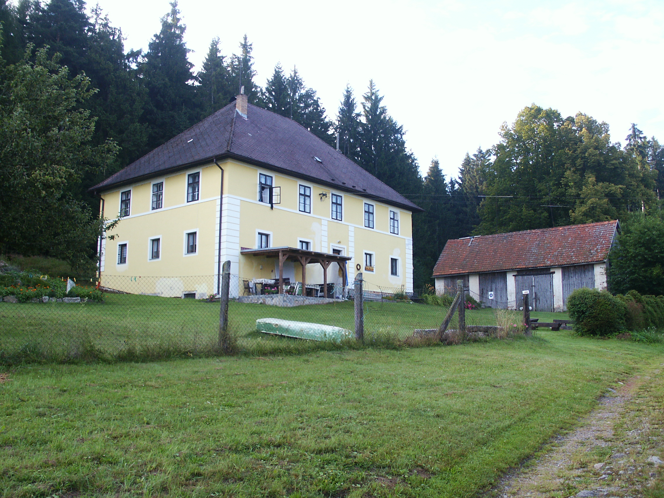 Nové Domky - č.p. 14